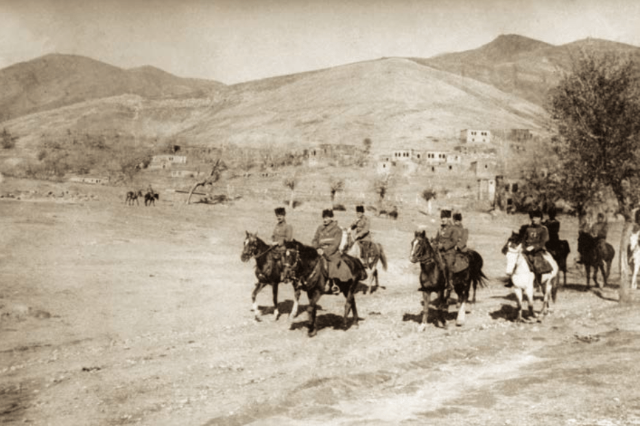 16. Kolordu Komutanı Mustafa Kemal Paşa (Atatürk), Bitlis, 16 Kasım 1916